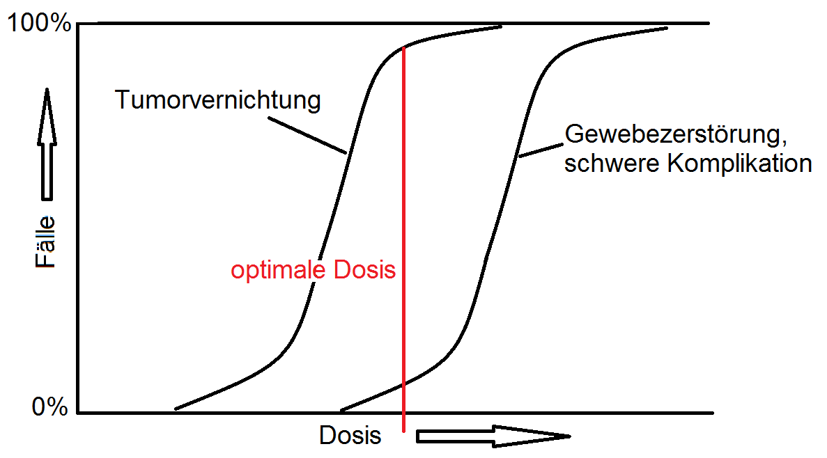 Dosis-Wirkungs-Beziehung Response versus dose relationship